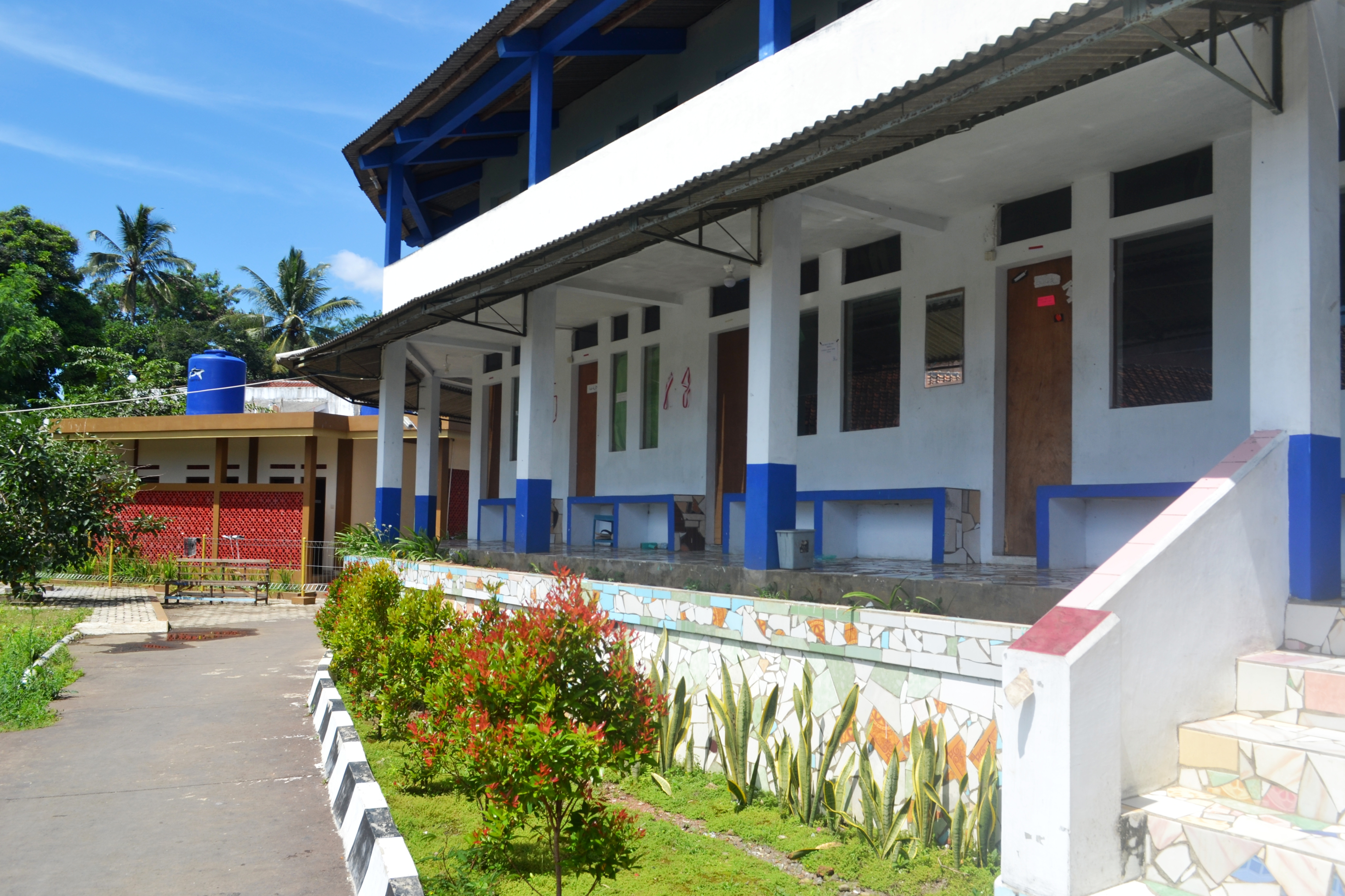 asrama